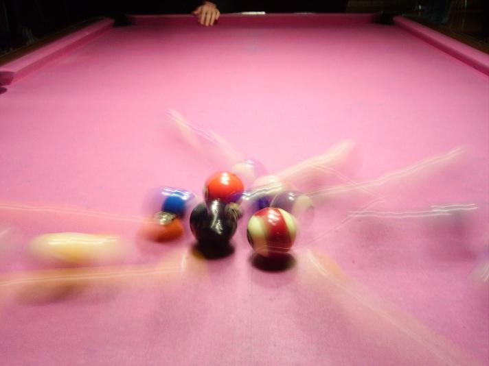 Poolgame just starting